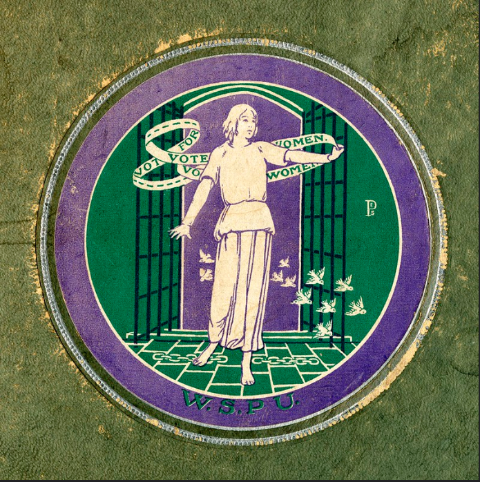 La nuova organizzazione, al contrario della NUWSS (da cui si era distaccata), riservò la partecipazione solo alle donne. Promosse una campagna per la riforma sociale, in gran parte in concomitanza con l' "Independent Labour Party" (Partito operaio indipendente) e una per l'estensione del suffragio femminile.